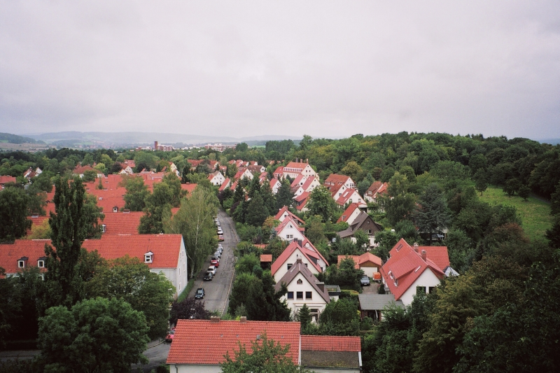 Blick vom Turm der Friedenskirche in Göttingen Richtung Nordwesten über den Hagenberg zum Holtenser Berg View from Tower of "Friedenskirche" in Göttingen over "Hagenberg" and "Holtenser Berg"